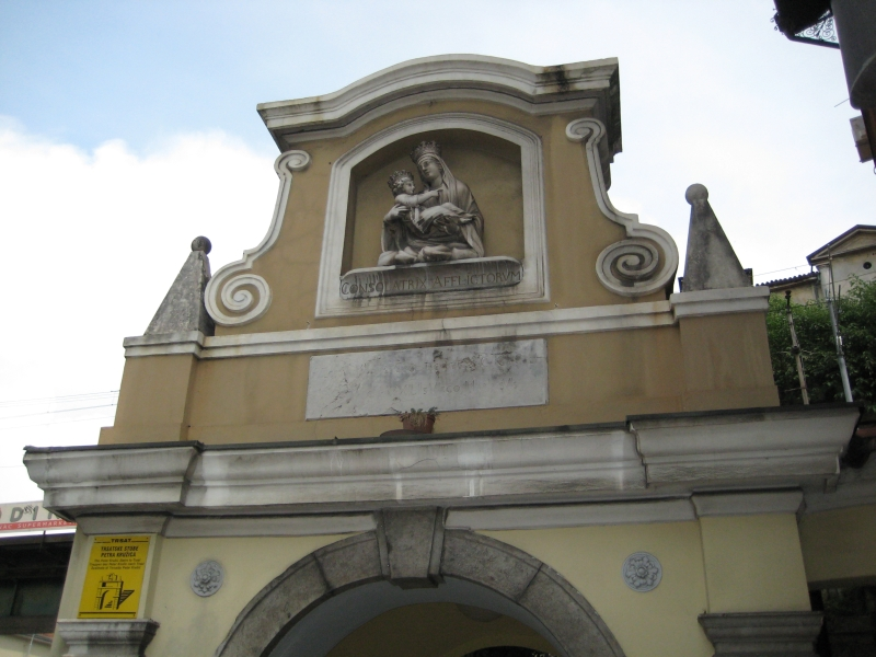 Ulazni trijem s reljefnim likom okrunjene Bogorodice s Kristom u ruci. Iznad ulaza piše: CONSOLATRIX AFLICTORUM (tješiteljica tužnih). S njega se ulazi na Trsatske stube koje je 1531. dao sagraditi kraljevski kapetan u Klisu, Petar Kružić.